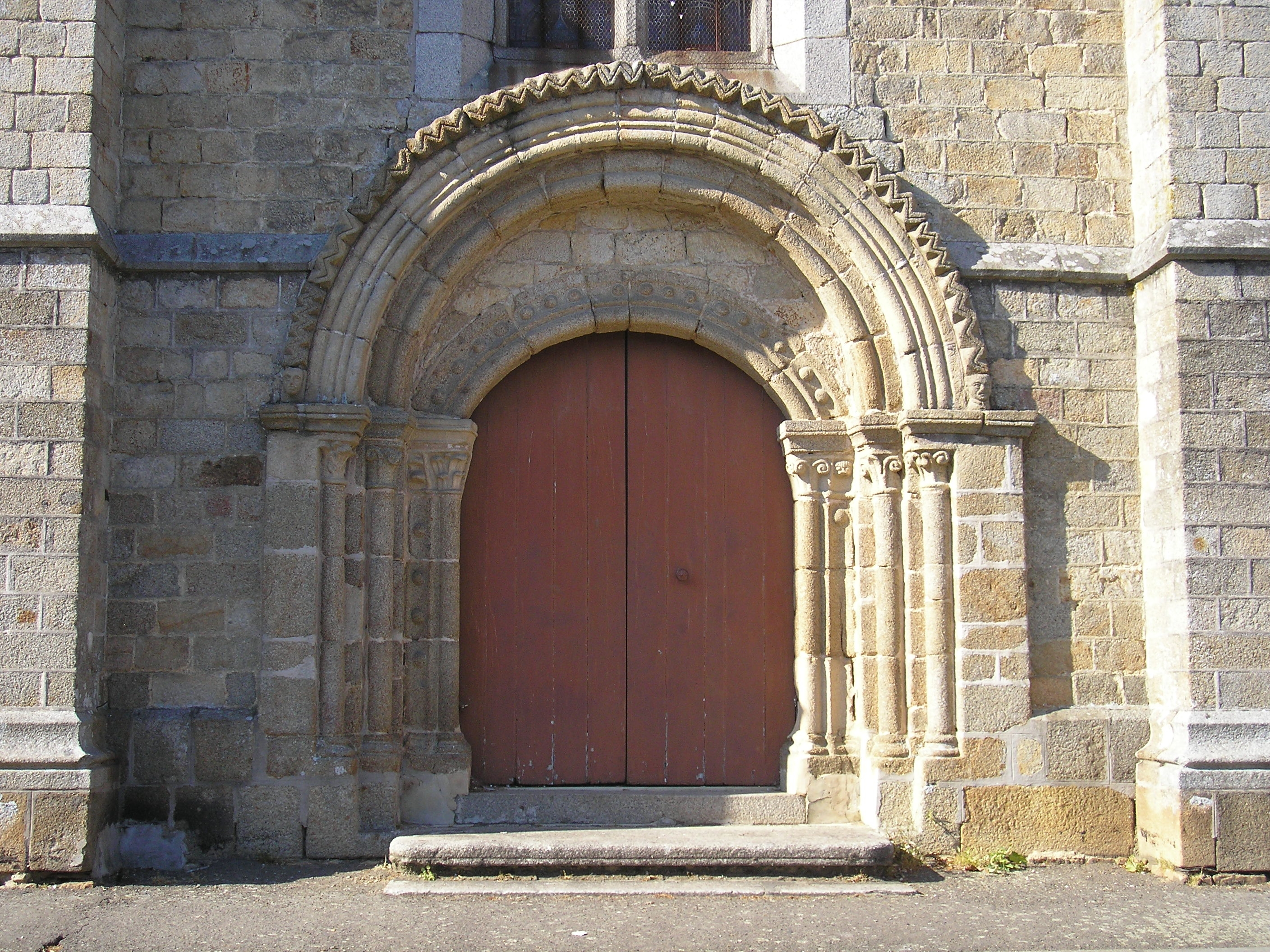 Sartilly (Normandie, France). Le portail roman de l'église Saint-Pair.